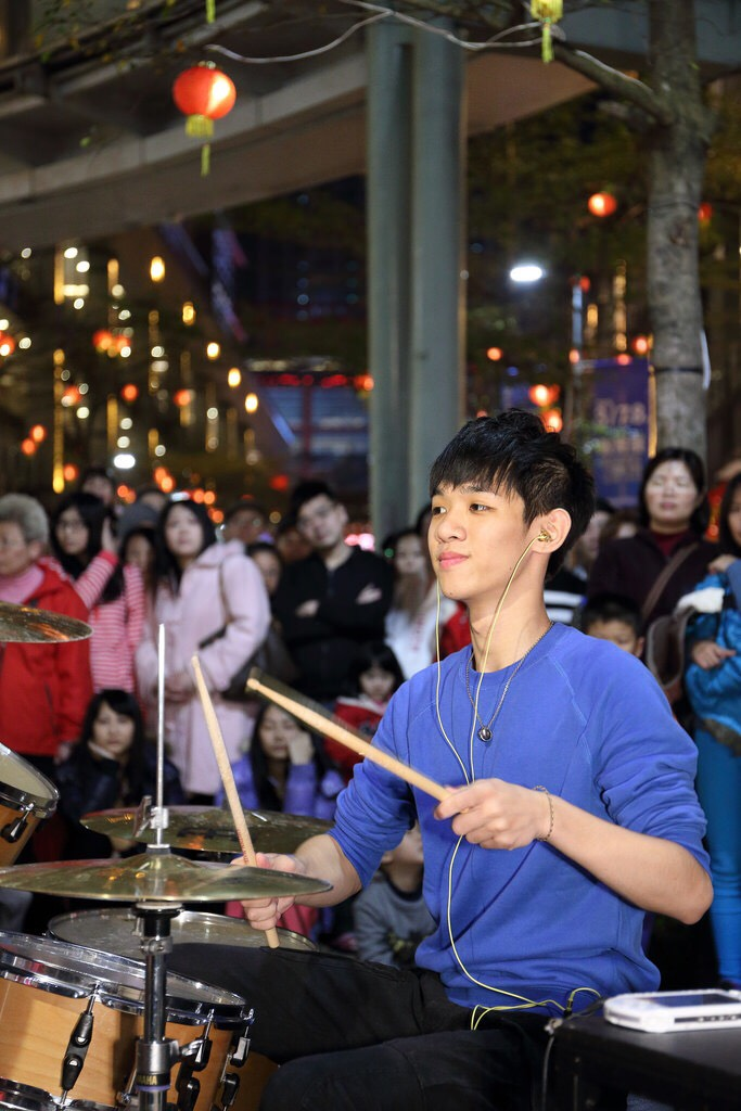 中文（台灣）: 臺北市街頭藝人李科穎於信義威秀影城廣場演出。